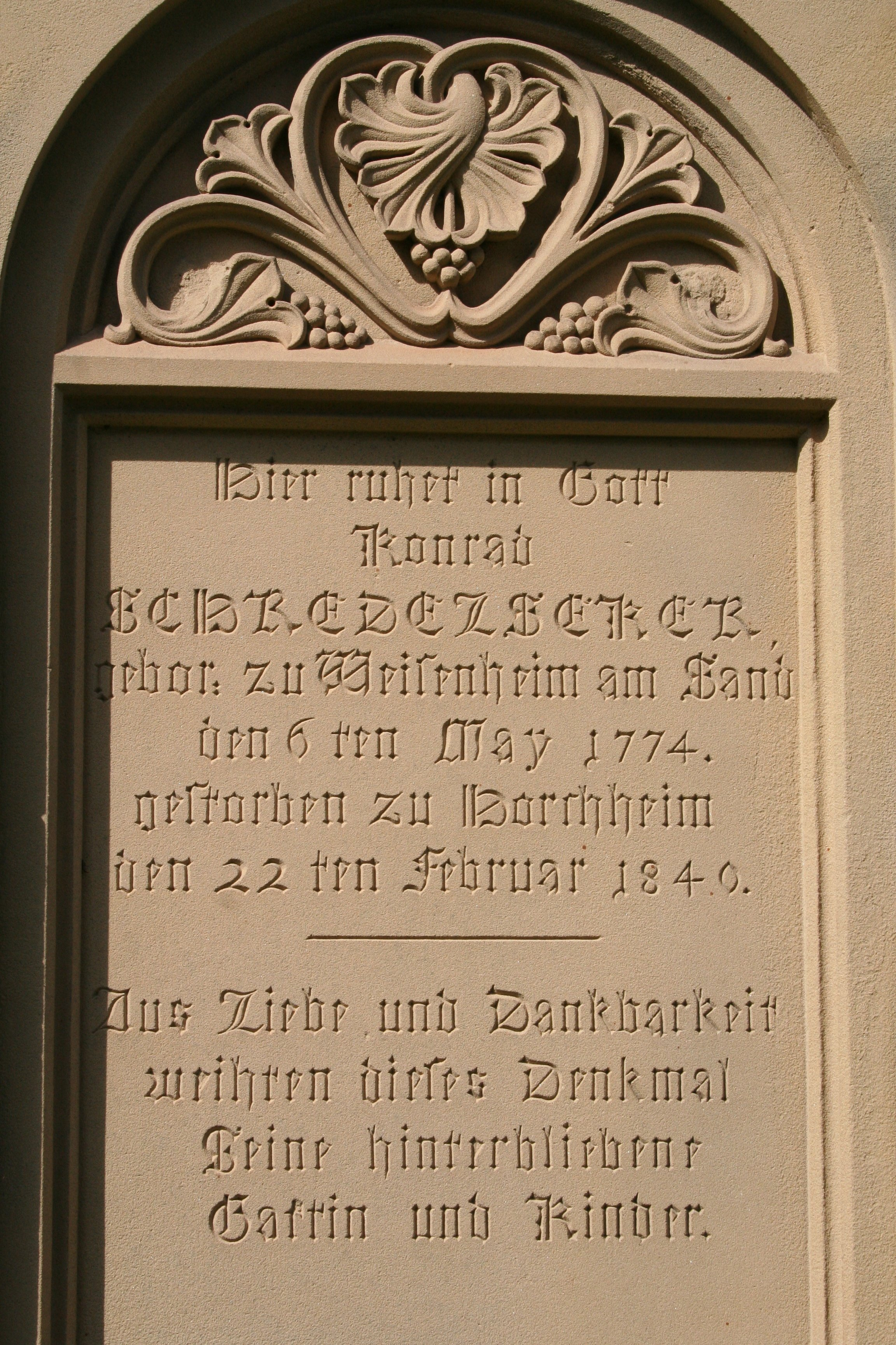 Worms-Horchheim Inschrift des Grabmals für Konrad Schredelseker auf dem ehemaligen Friedhof